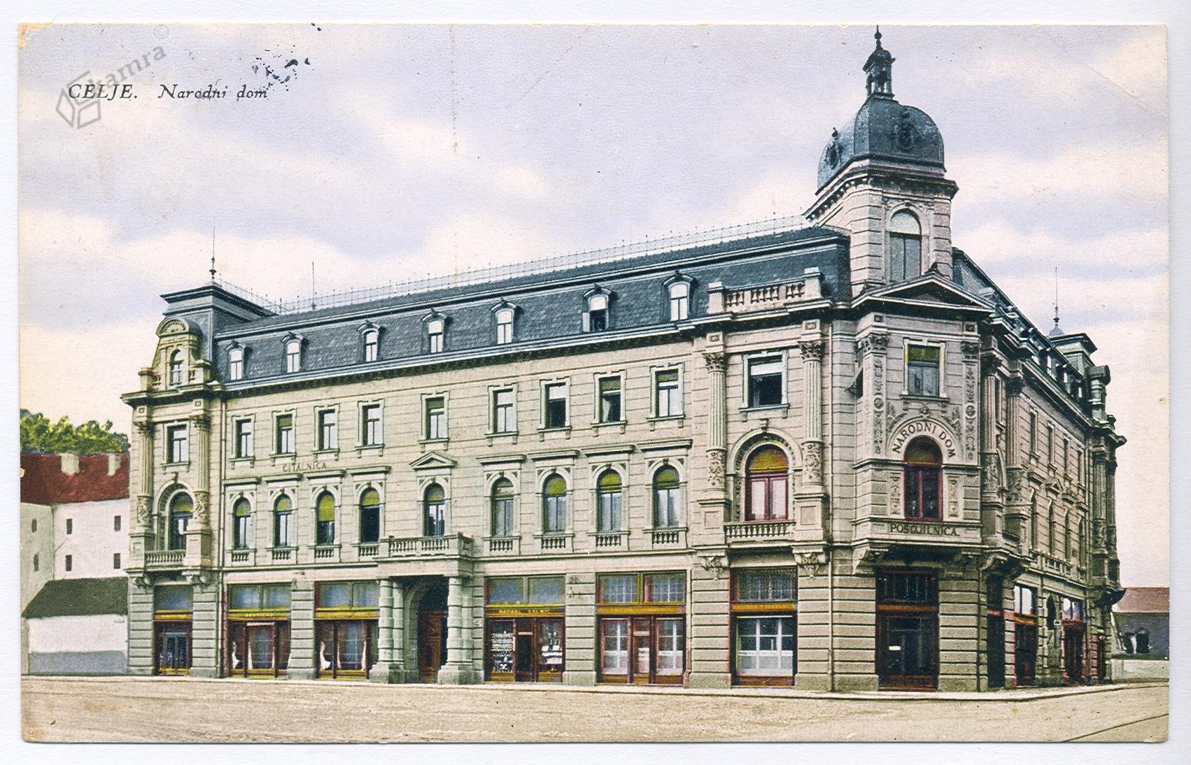 Razglednica celjskega narodnega doma.